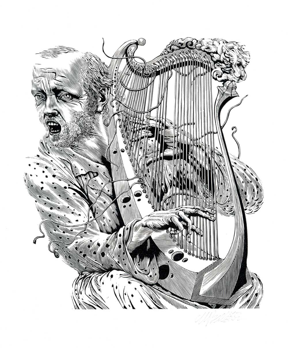 Графический лист, гравюра на дереве